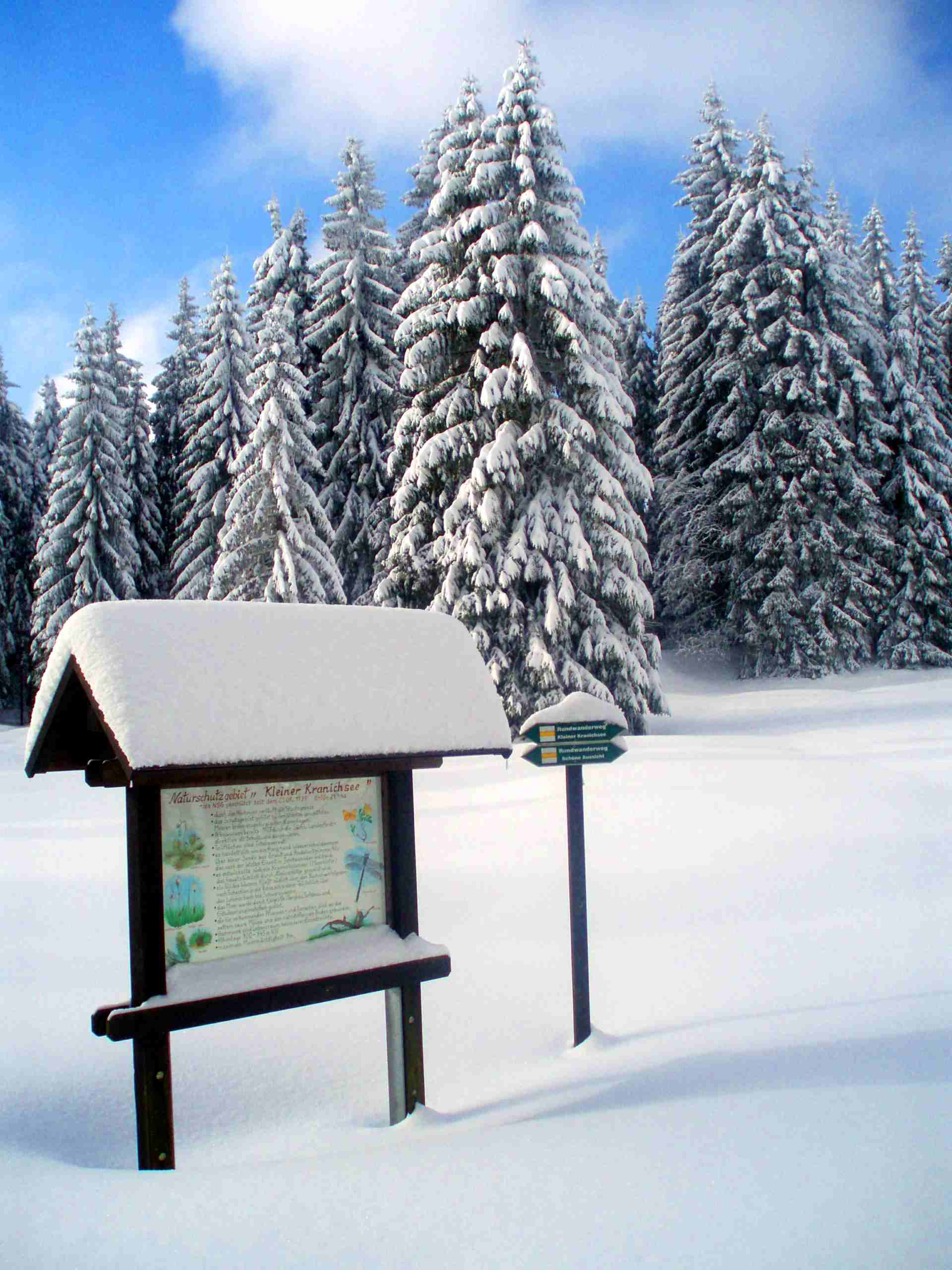 Blick zum Kleinen Kranichsee im Winter